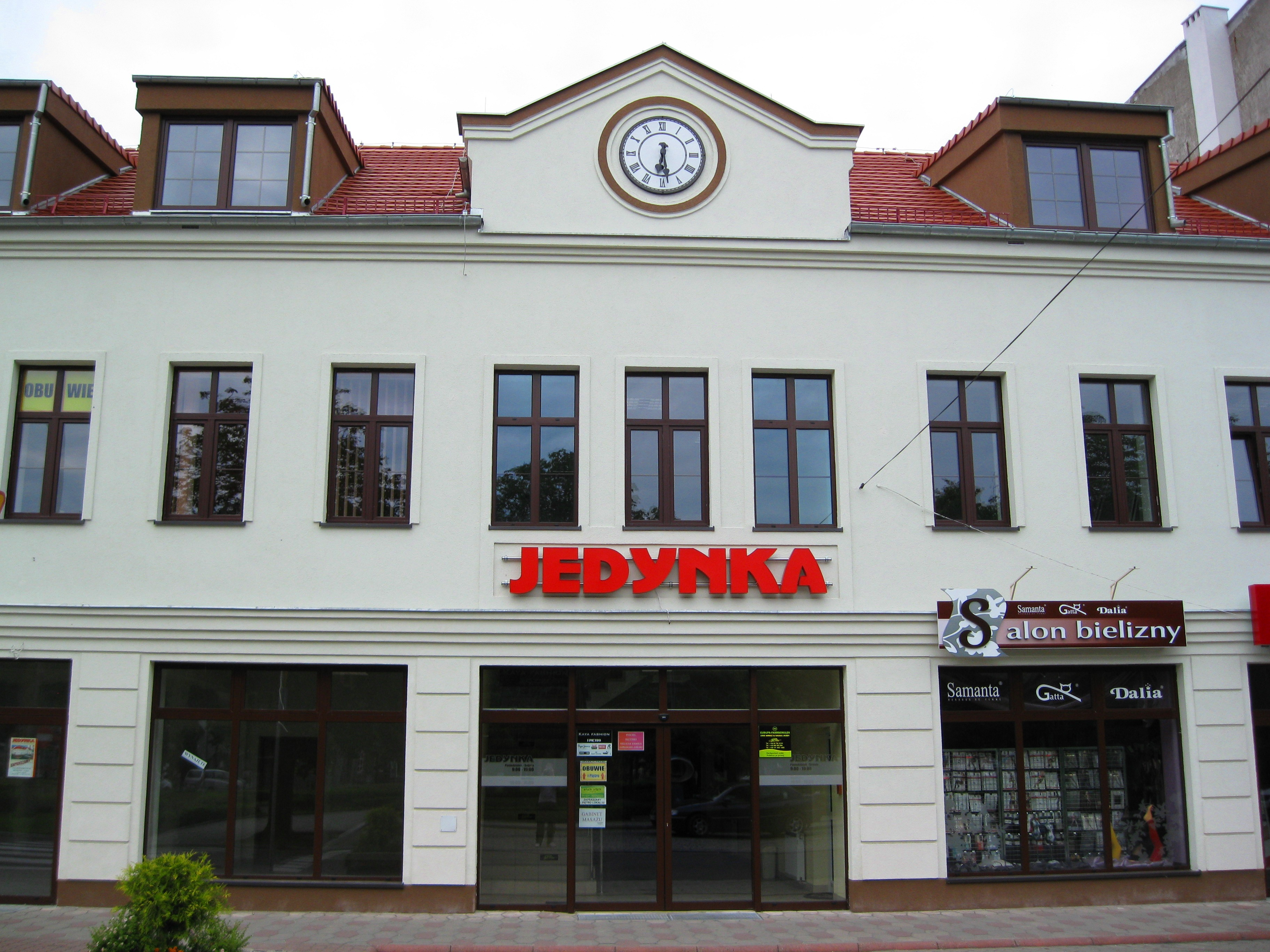 Budynek Galerii „Jedynka” (dawna szkoła), nazywany potocznie „ratuszem”.